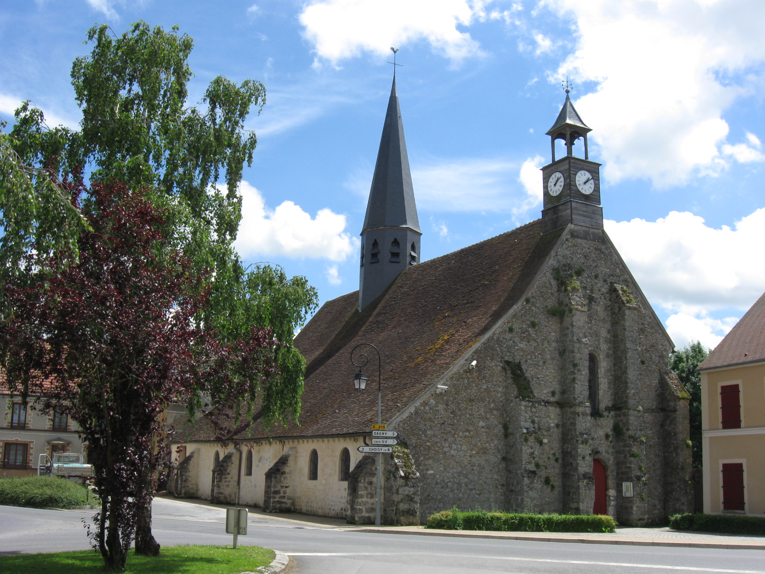 Église Saint-Thibault de Chevru. (Seine-et-Marne, région Île-de-France).